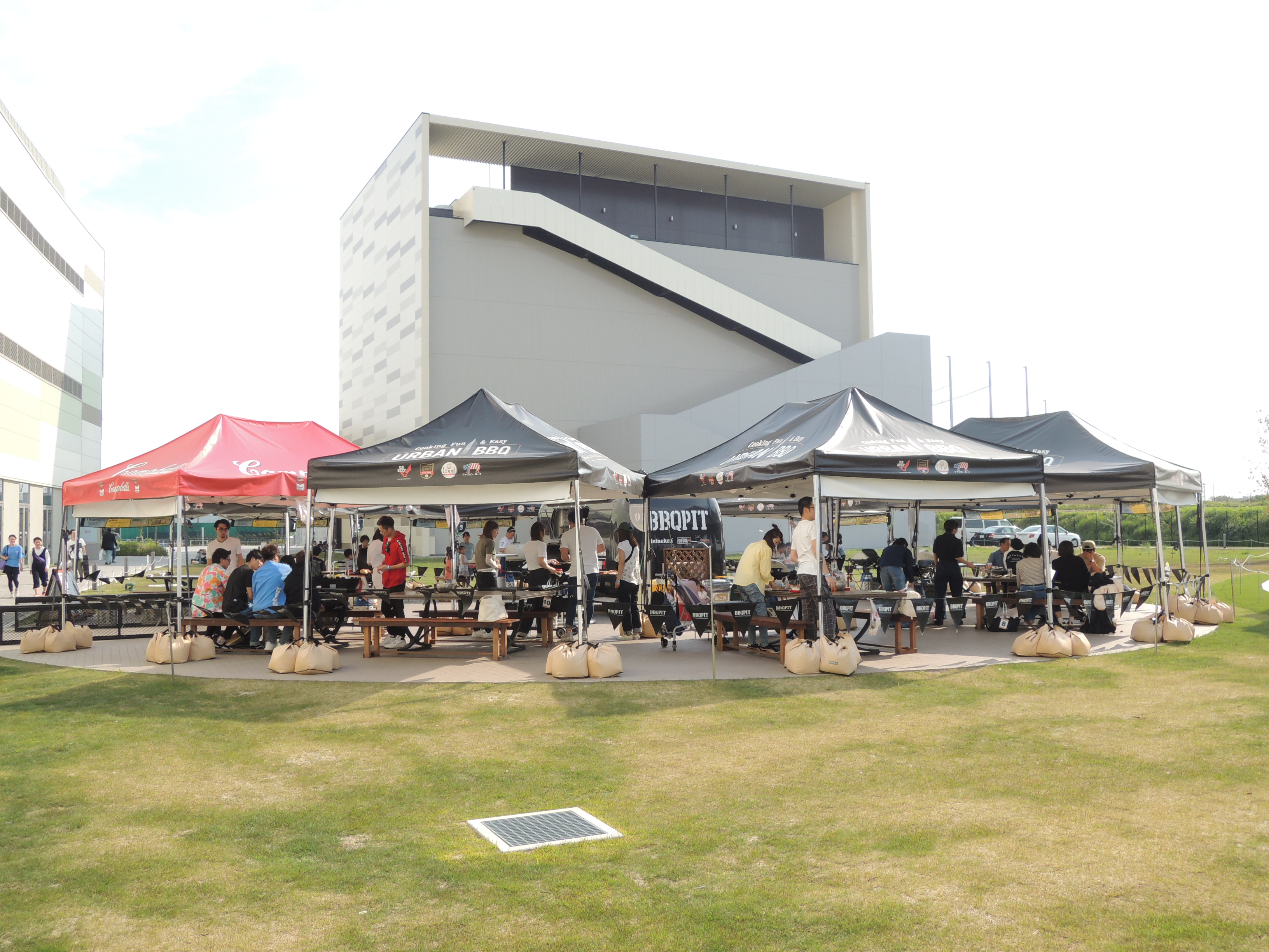 ららぽーと名古屋みなとアクルス 屋外バーベキュースペース BBQPIT Nikon Coolpix P310